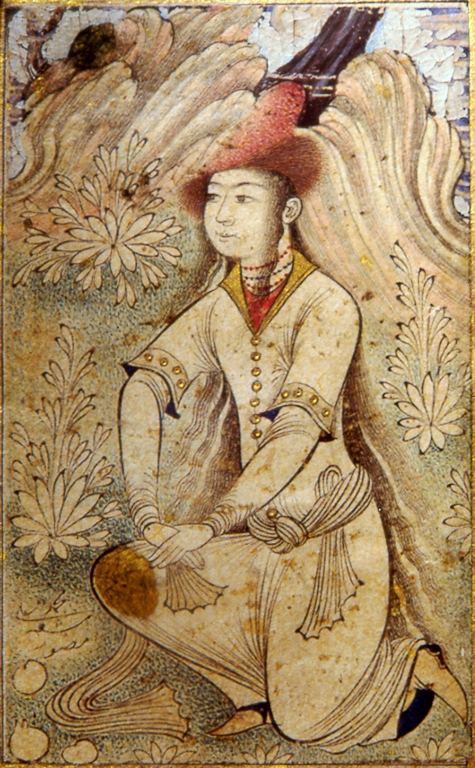 Мухаммад Али. Портрет юноши в меховой шапке.